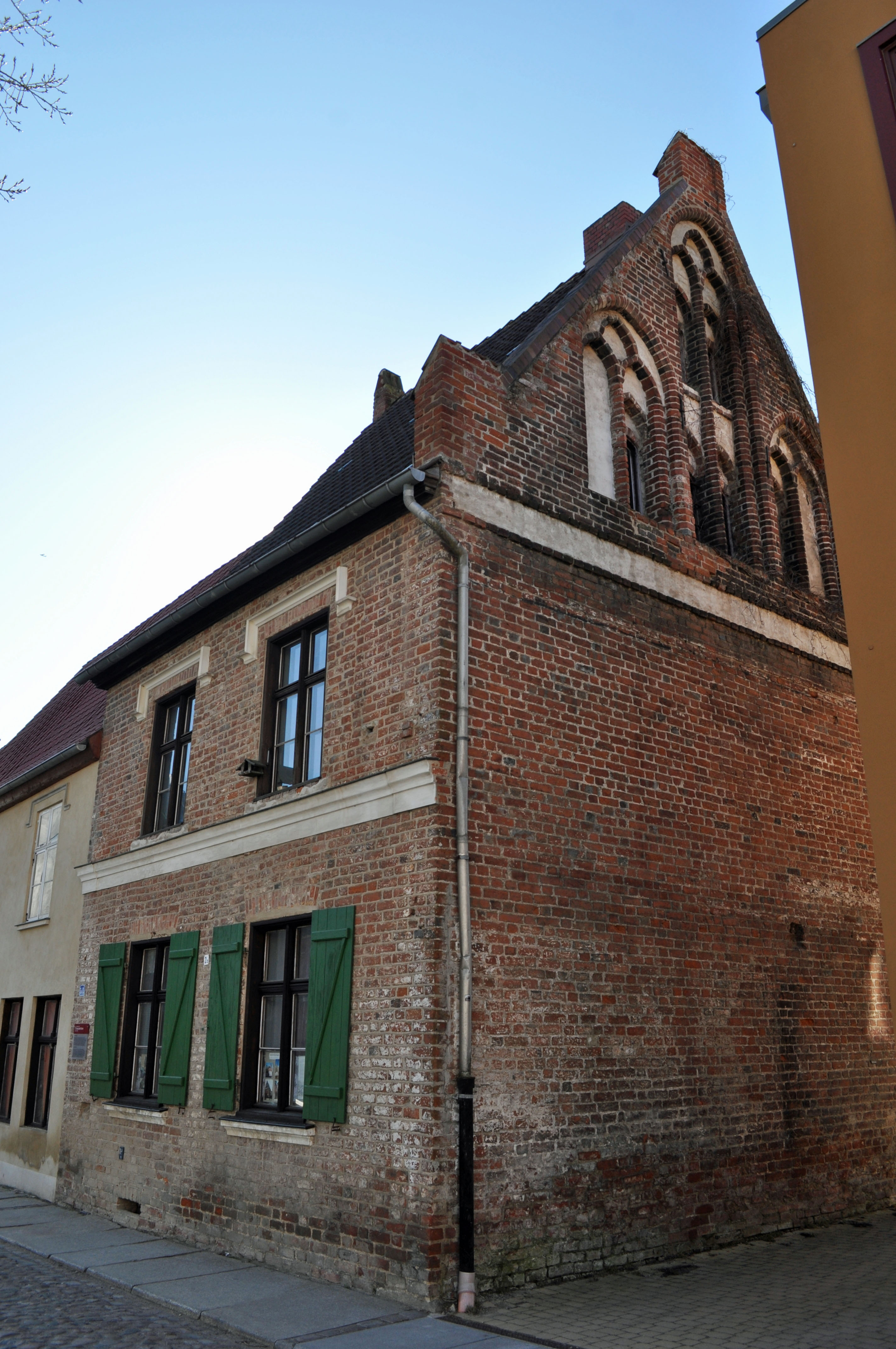 Gebäude bzw. Gebäudedetail in Stralsund. Straße und Hausnummer siehe Dateiname. Scharfrichterhaus (Stralsund) Das Gebäude ist als Baudenkmal ausgewiesen, siehe dazu die Liste der Baudenkmale in Stralsund.